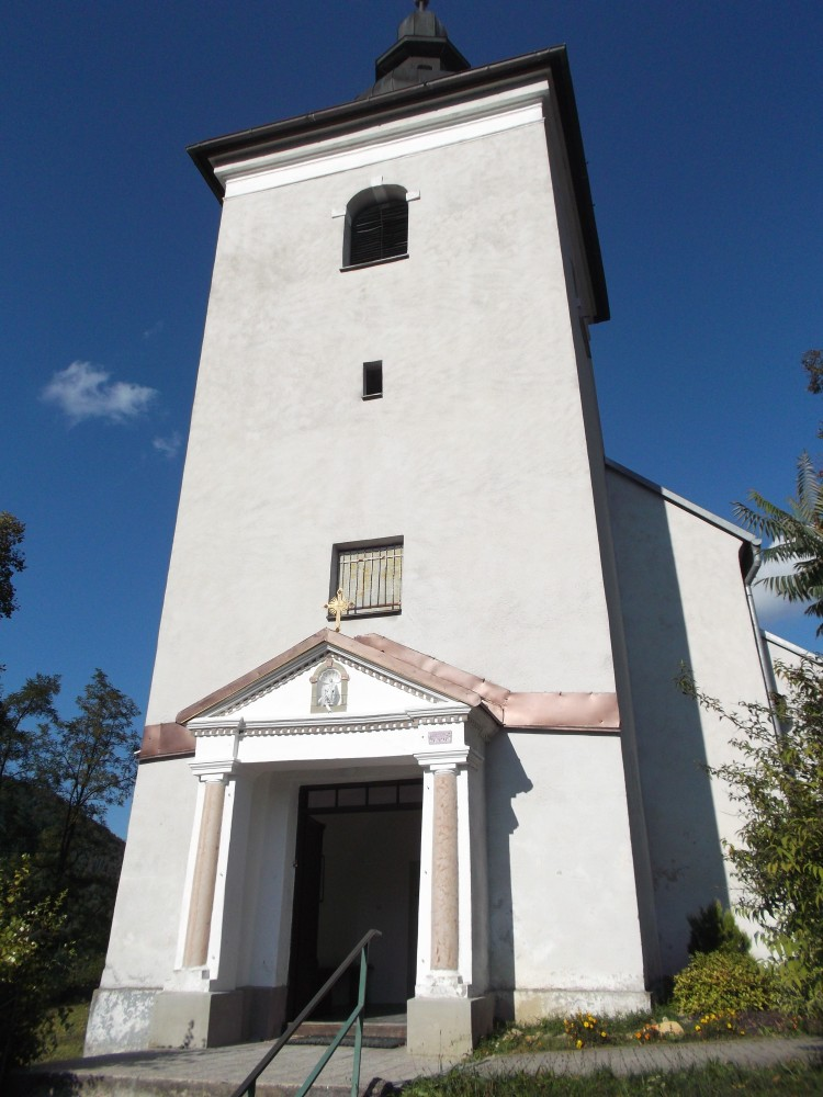 Kostol